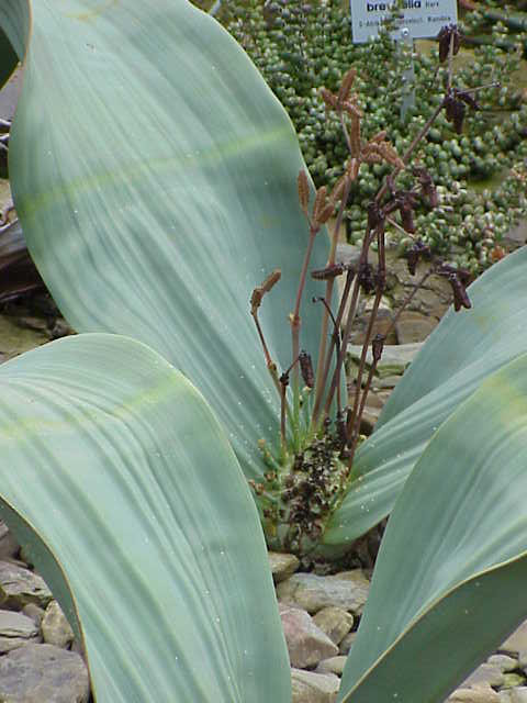 ♀ Welwitschia mirabilis (Welwitschiaceae)